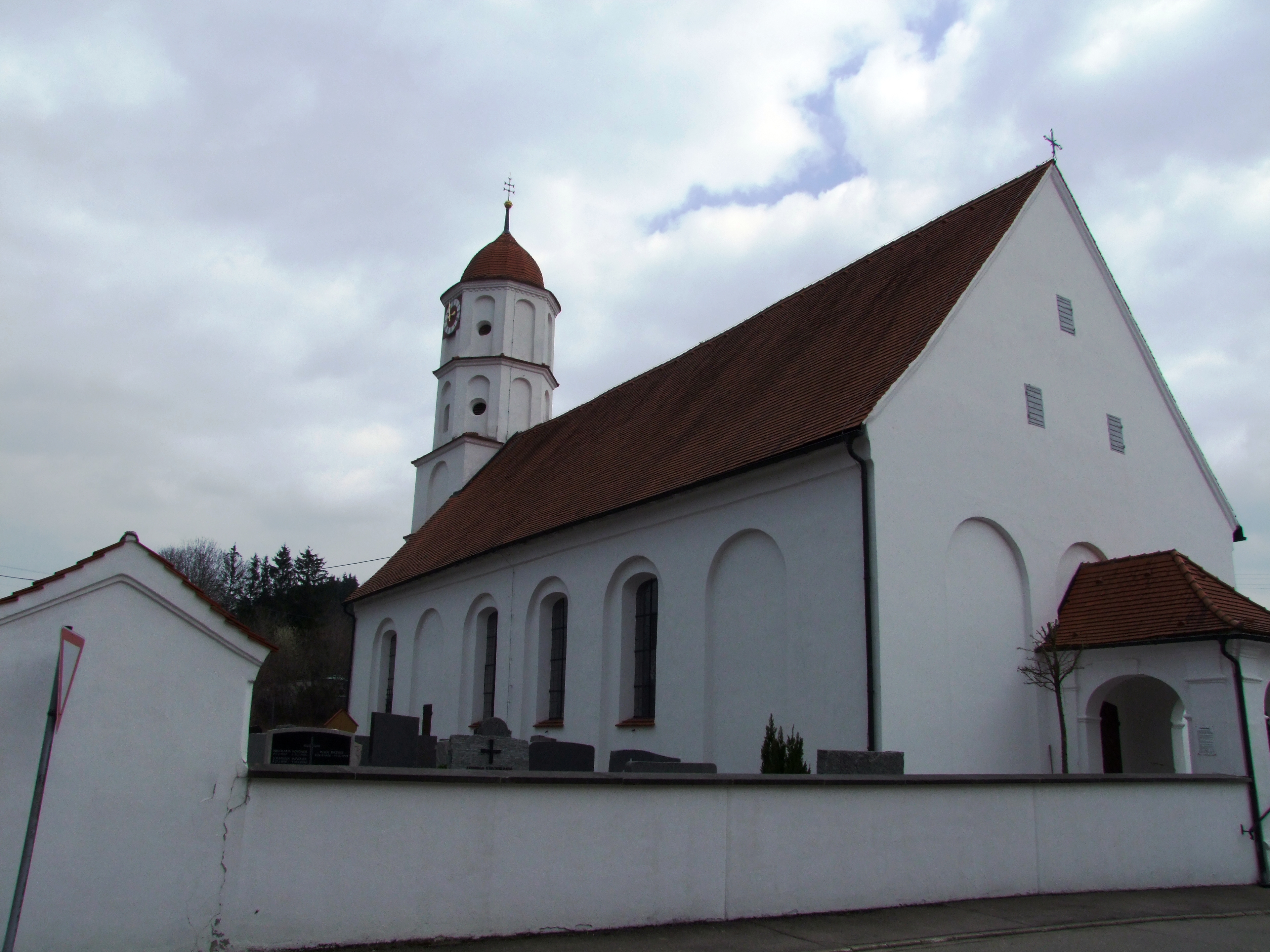 Die Zur-Heiligsten-Dreifaltigkeit-Kirche im oberschwäbischen Kronburg bei Memmingen.